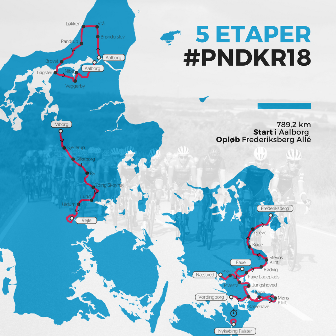 Rutekort PostNord Danmark Rundt 2018. 5 etaper. 789 kilometer ialt.